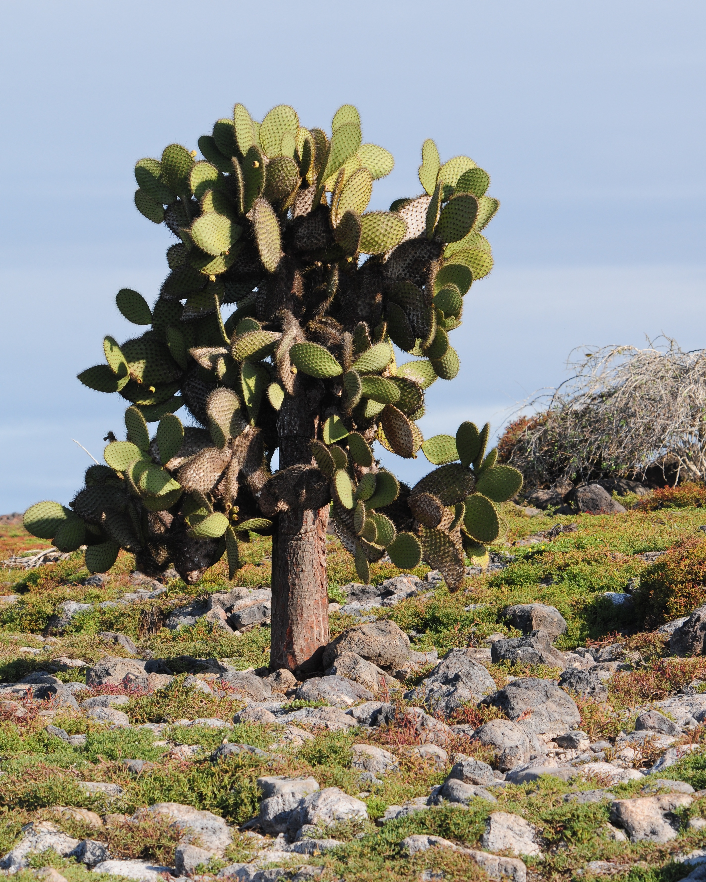 Opuntia